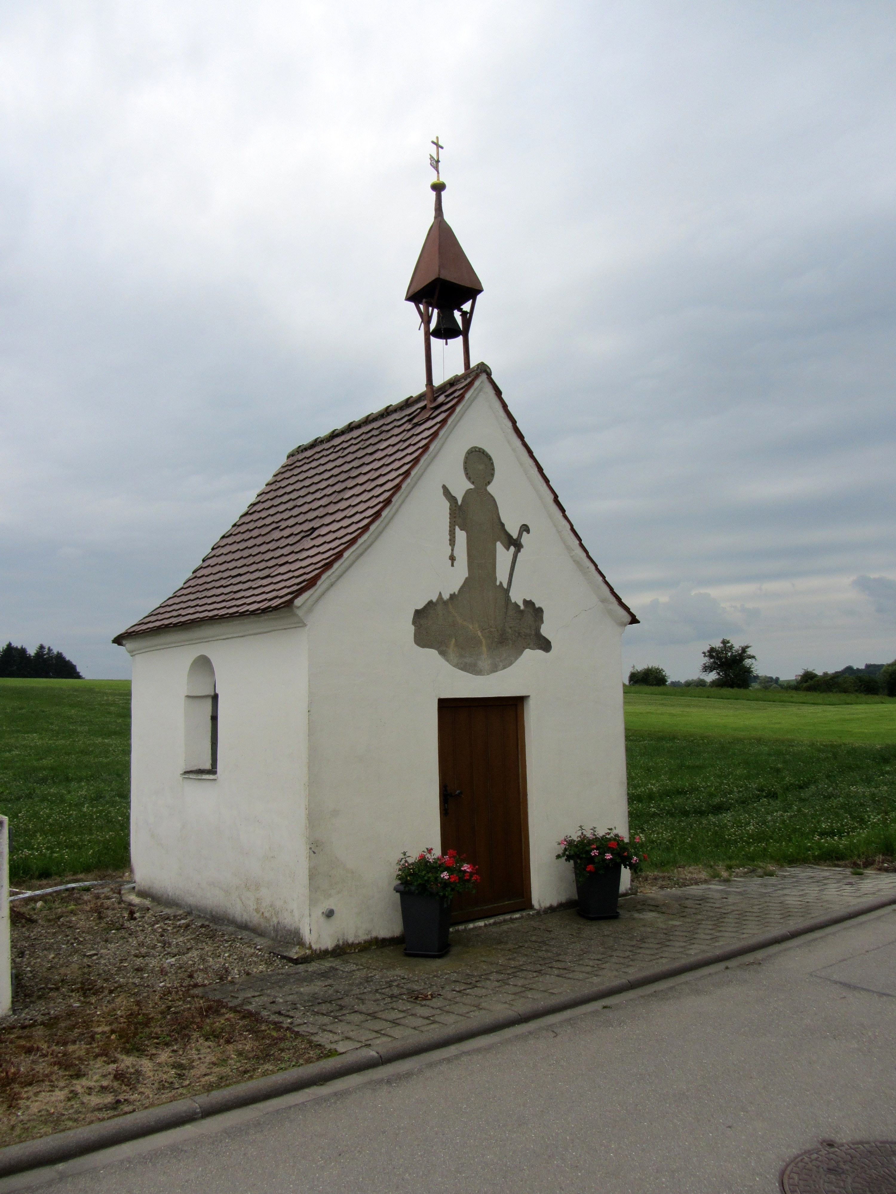 Bruder Klaus Kapelle im Teilort Binnrot, 88450 Binnrot, Deutschland